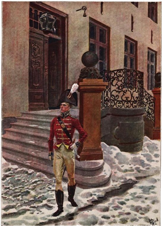 «Utenfor den gamle krigsskole i Kristiania»